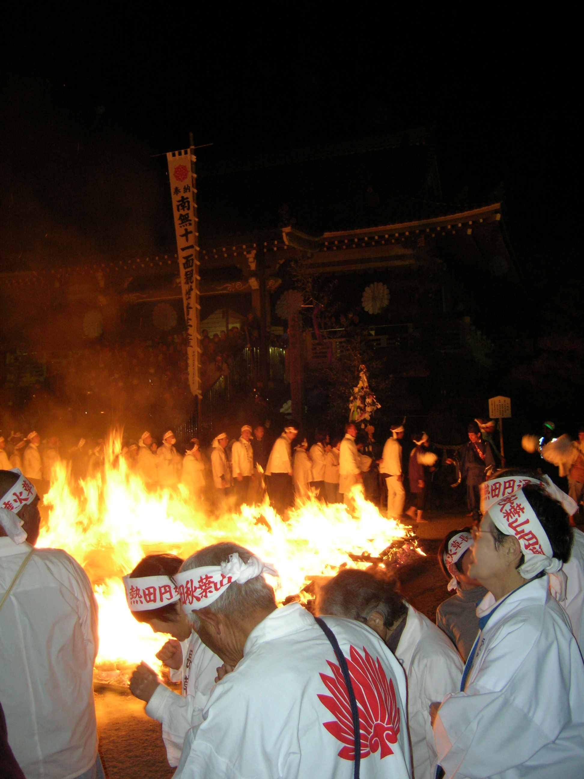 Entsū-ji temple, Hiwatari-shinji (Firewalking). 円通寺 (名古屋市)・火渡り神事（火まつり）